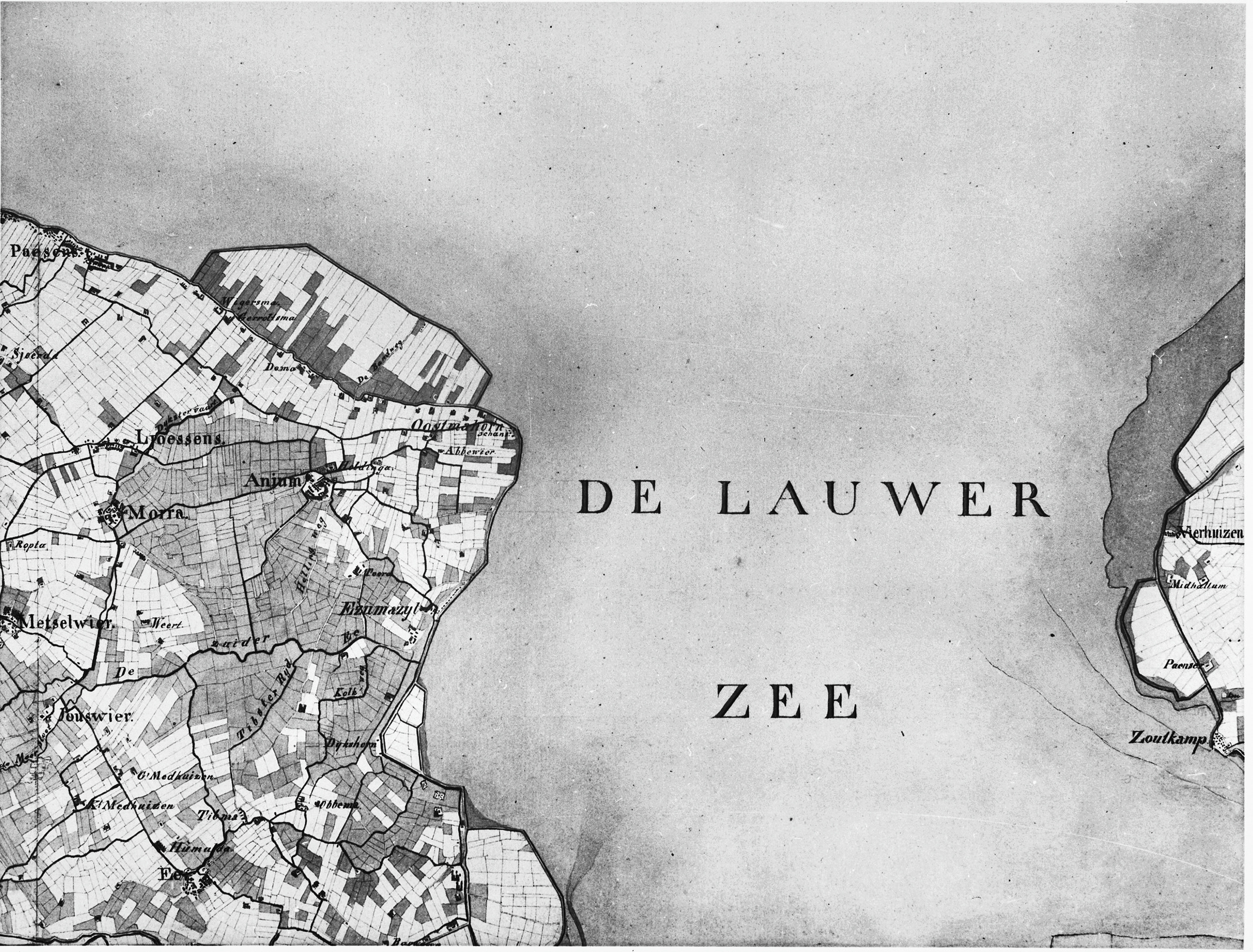 diverse Hottinger kaarten, origineel Rijksarchief 's-Gravenhage.